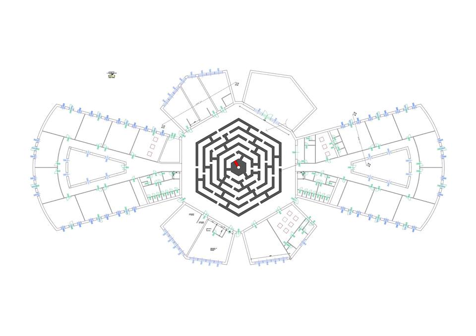 Il labirinto è collocato in un atrio di circa 700 mq, realizzato in piastrelle di gres 60x60 su schema esagonale. Esistono 6 ingressi per giungere al centro del labirinto. Solo quello posizionato davanti ai laboratori raggiunge il centro a significare che quando l'esperienza e le nozioni si armonizzano nel percorso didattico-formativo si raggiunge sempre l'obiettivo e la propria armonia